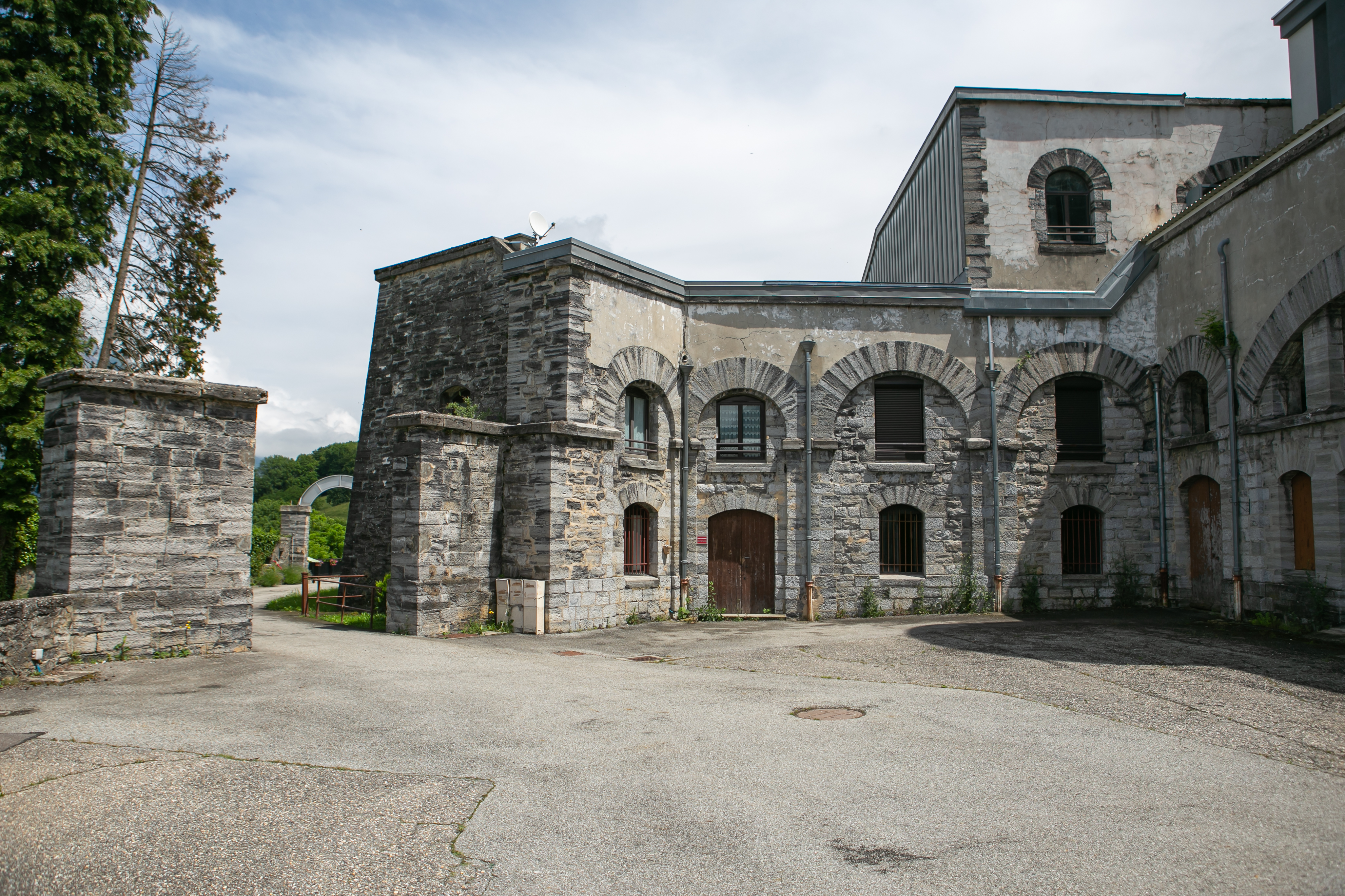 Vue Fort d'Aiton / Aiton / Savoie / France